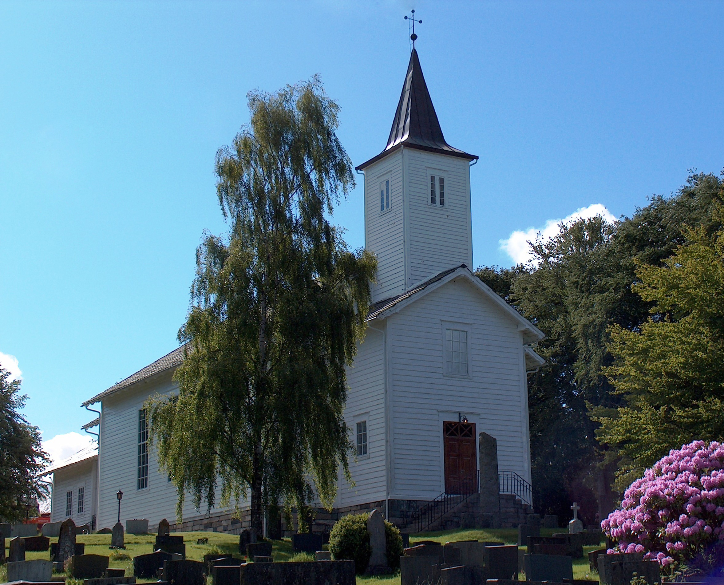 Fitjar kirke